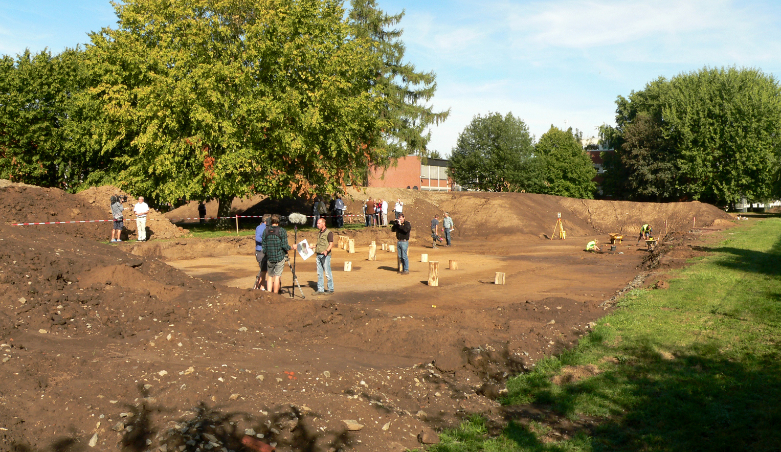 Grabungsfläche 2016 der Siedlung Rosdorf Mühlengrund